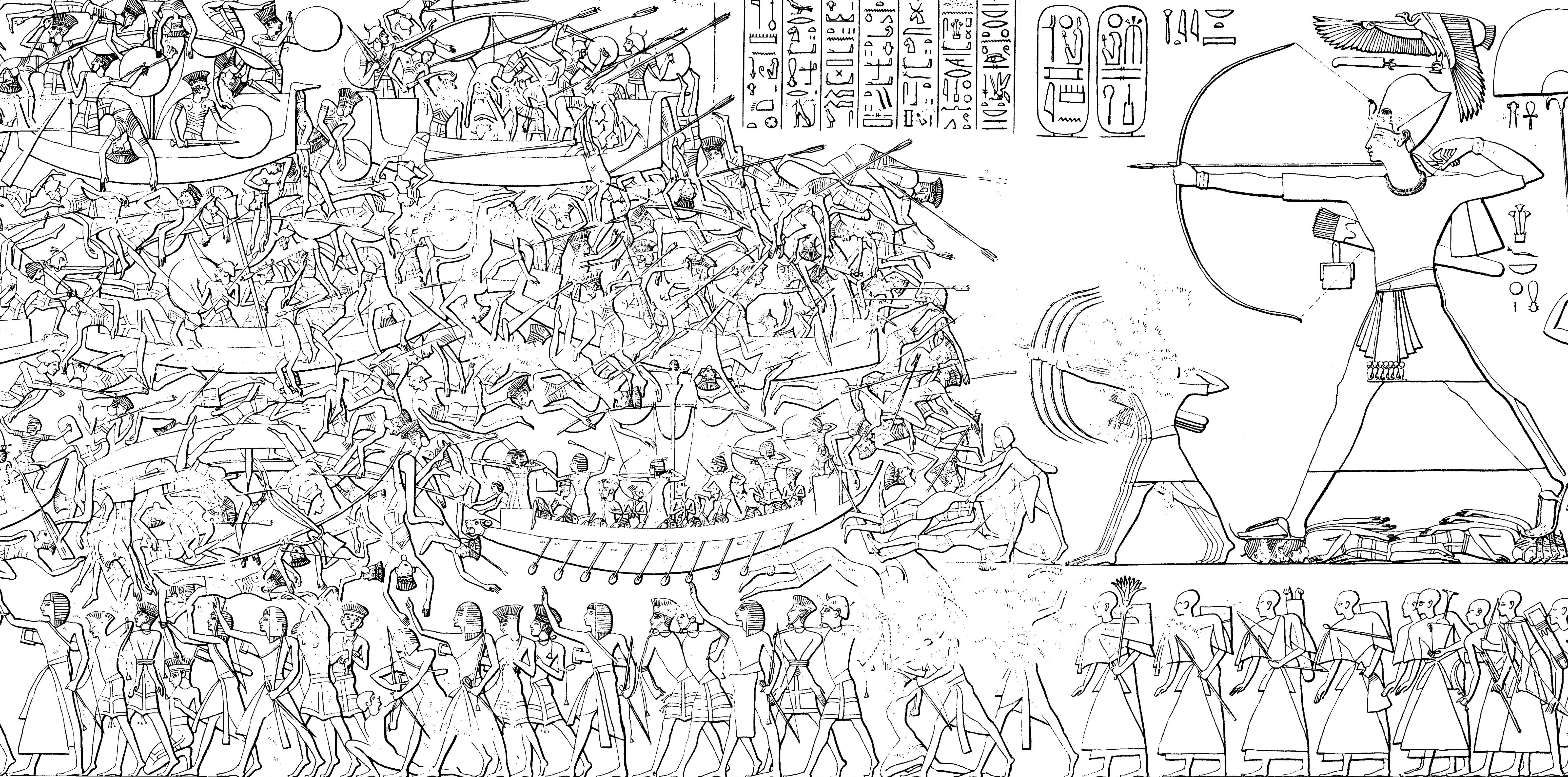 Umzeichnung des Seevölkerkrieges an der Nordostwand des Totentempels Ramses’ III. in Medinet Habu, Ägypten